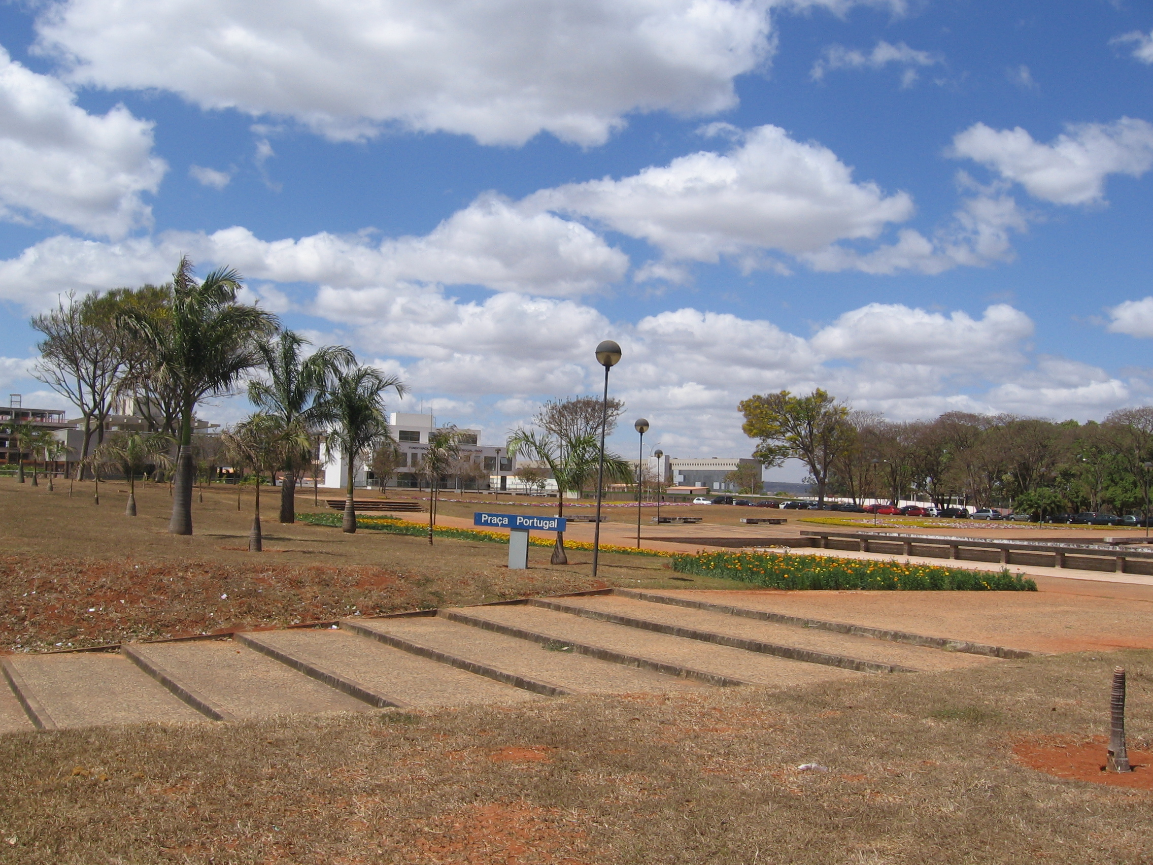 Portugal Square in Brasilia, Brazil